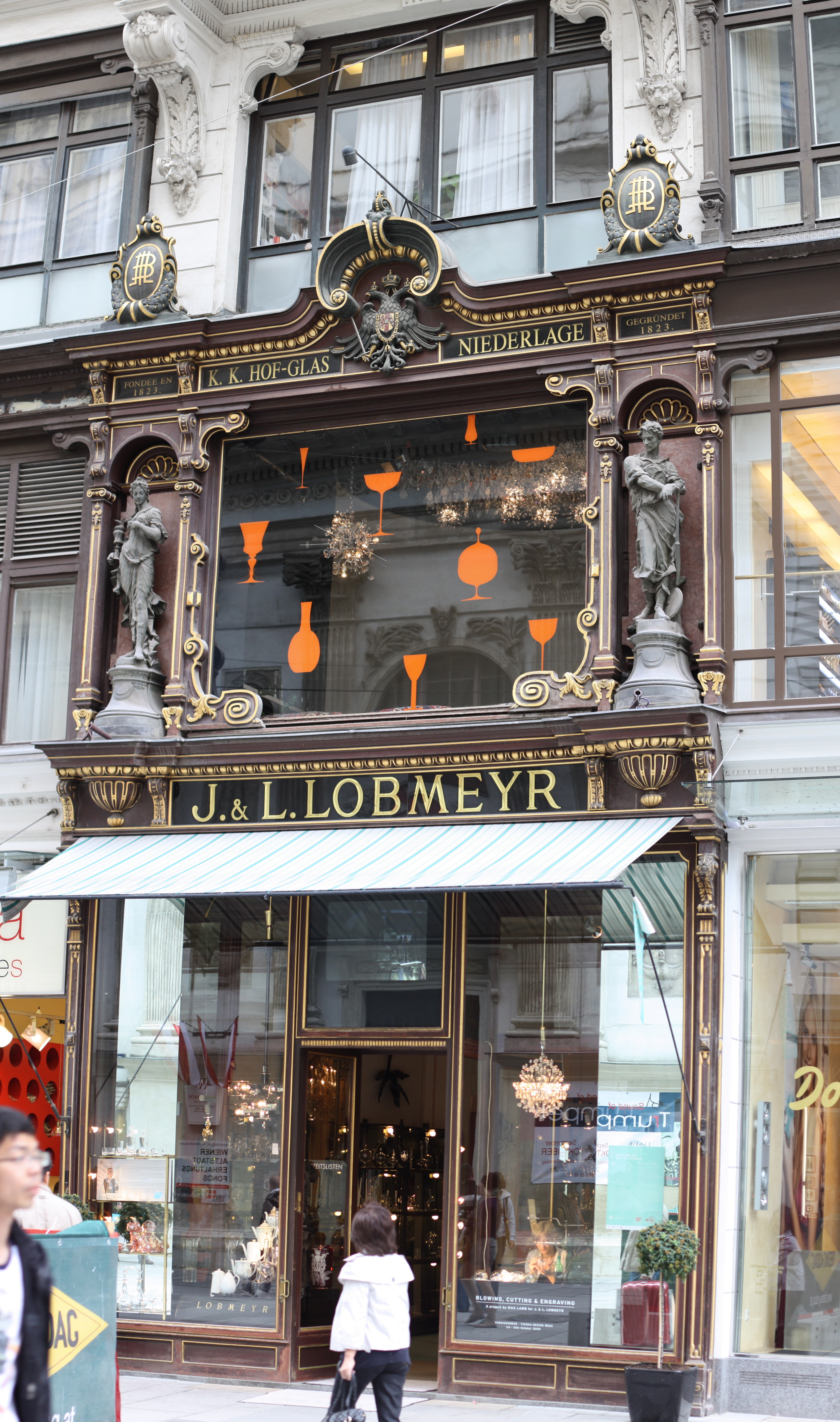 Zentrum, Vienna, Wien